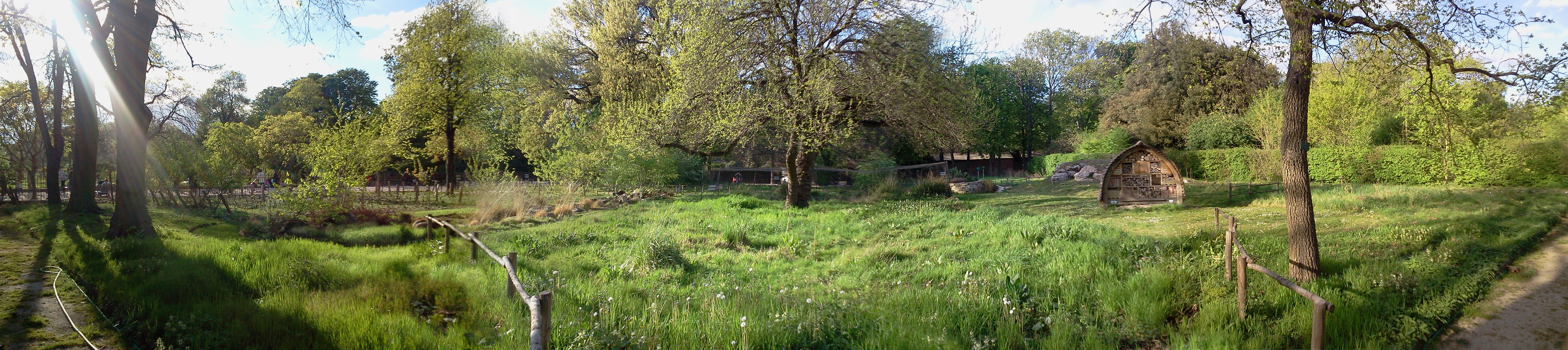 Panorama du Jardin Écologique dans le Jardin des plantes (Paris) depuis l'allée Roger Heim (ex-Centrale)